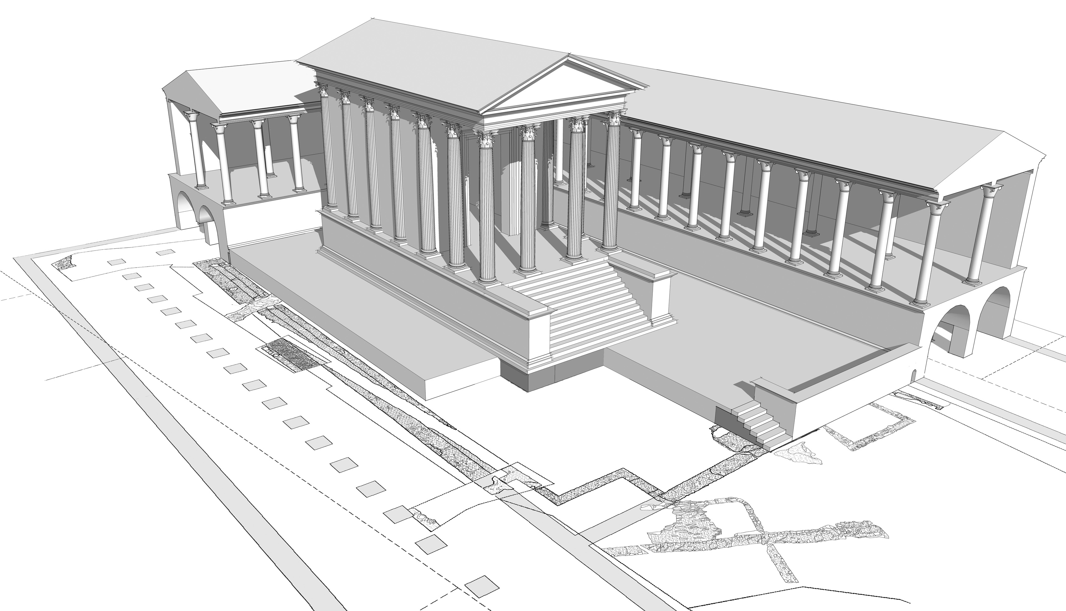 Segusio (Susa), Tempio del foro e porticati. Restituzione tridimensionale a partire dai dati di scavo (disegno F. Masino).